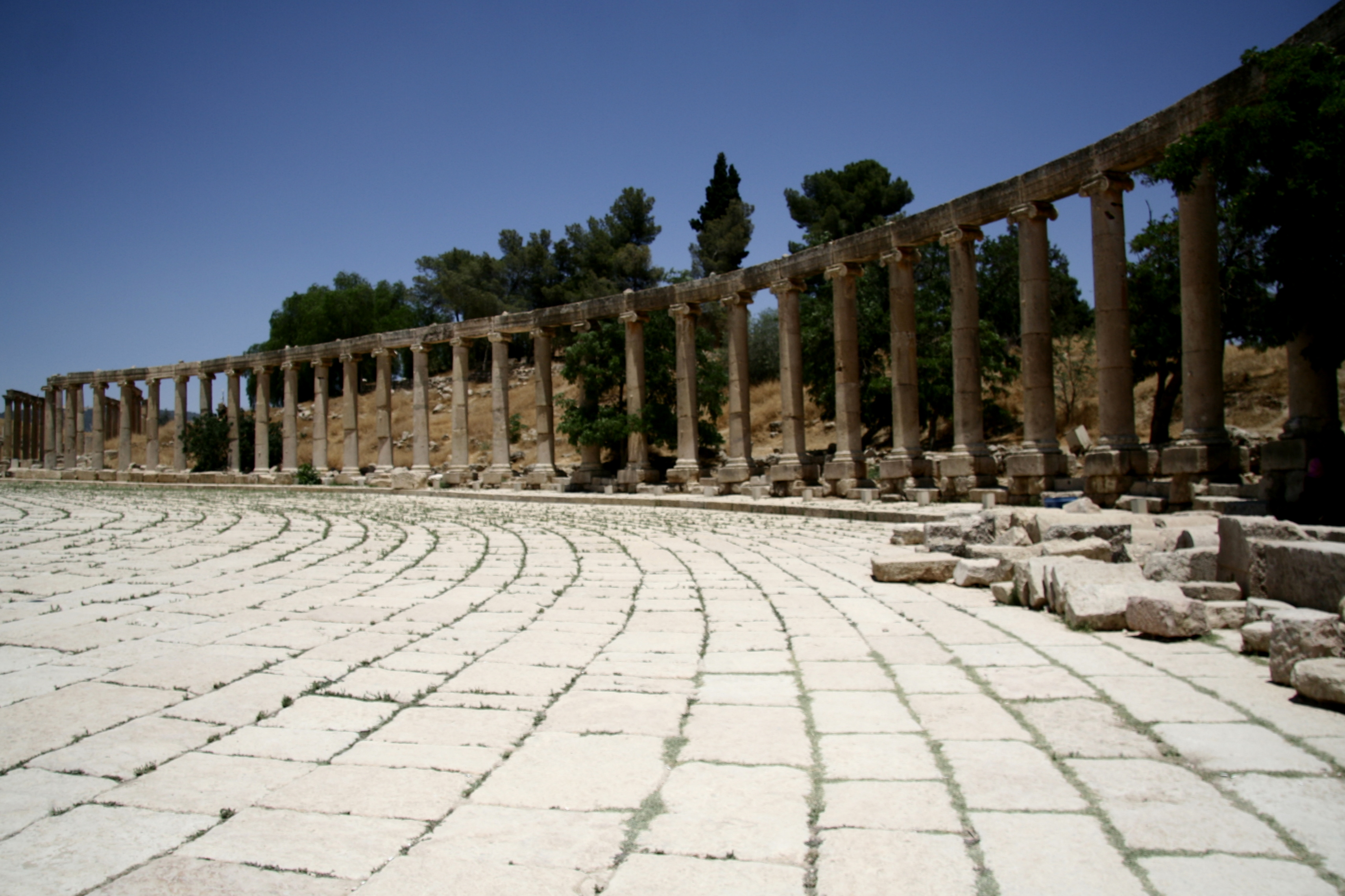 Развалины античной площади в городе Джераш, Иордания